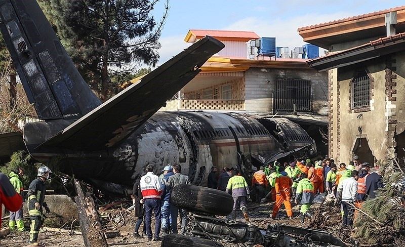 یک فروند هواپیمای باربری بوئینگ ۷۰۷ حامل گوشت از مبدا بیشکک کشور قرقیزستان، اقدام به فرود اضطراری در فرودگاه فتح کرج کرده بود که در هنگام فرود از باند خارج و پس از برخورد با دیوار انتهایی باند و شهرک مسکونی دچار آتش سوزی شد.